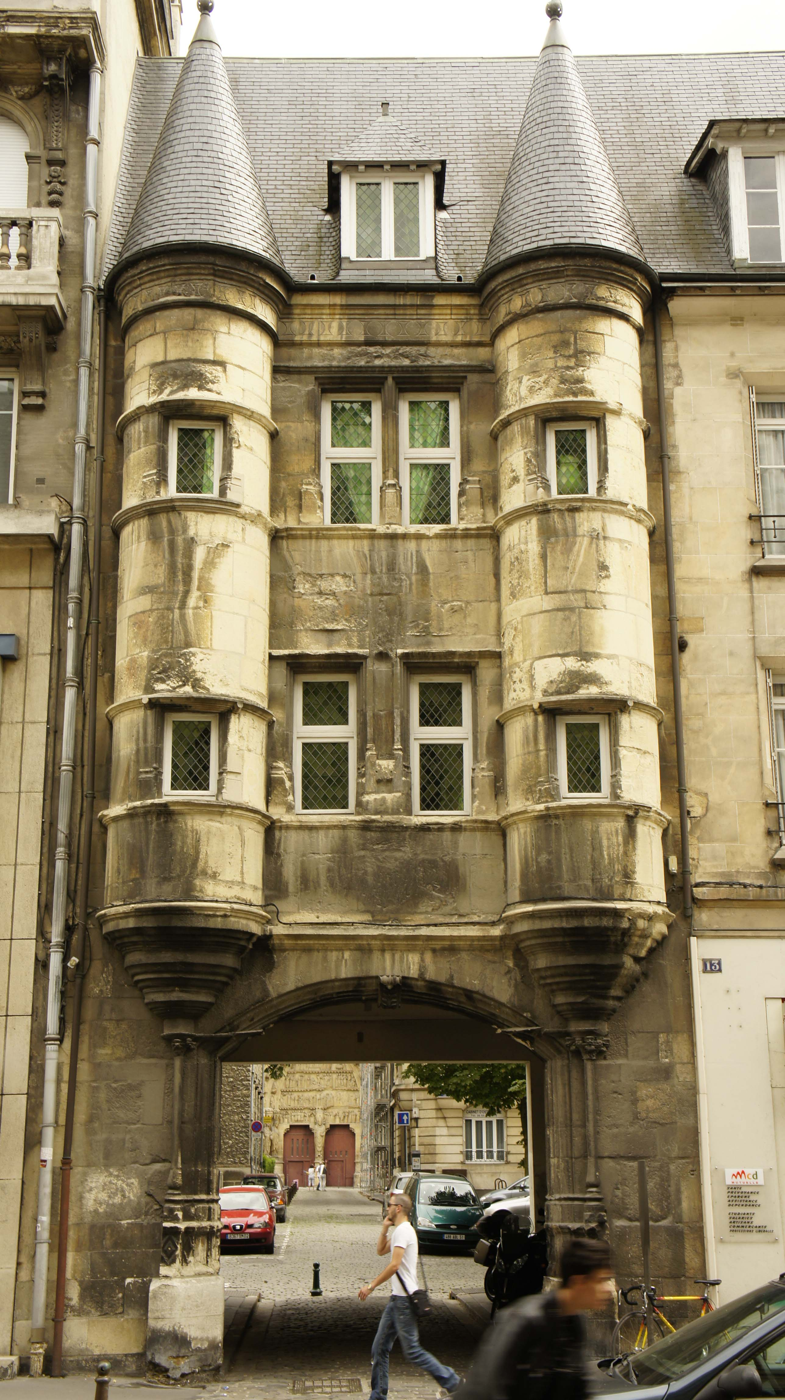 Ancienne porte du chapitre donnant sur le quartier du chapitre de l'évêché. .